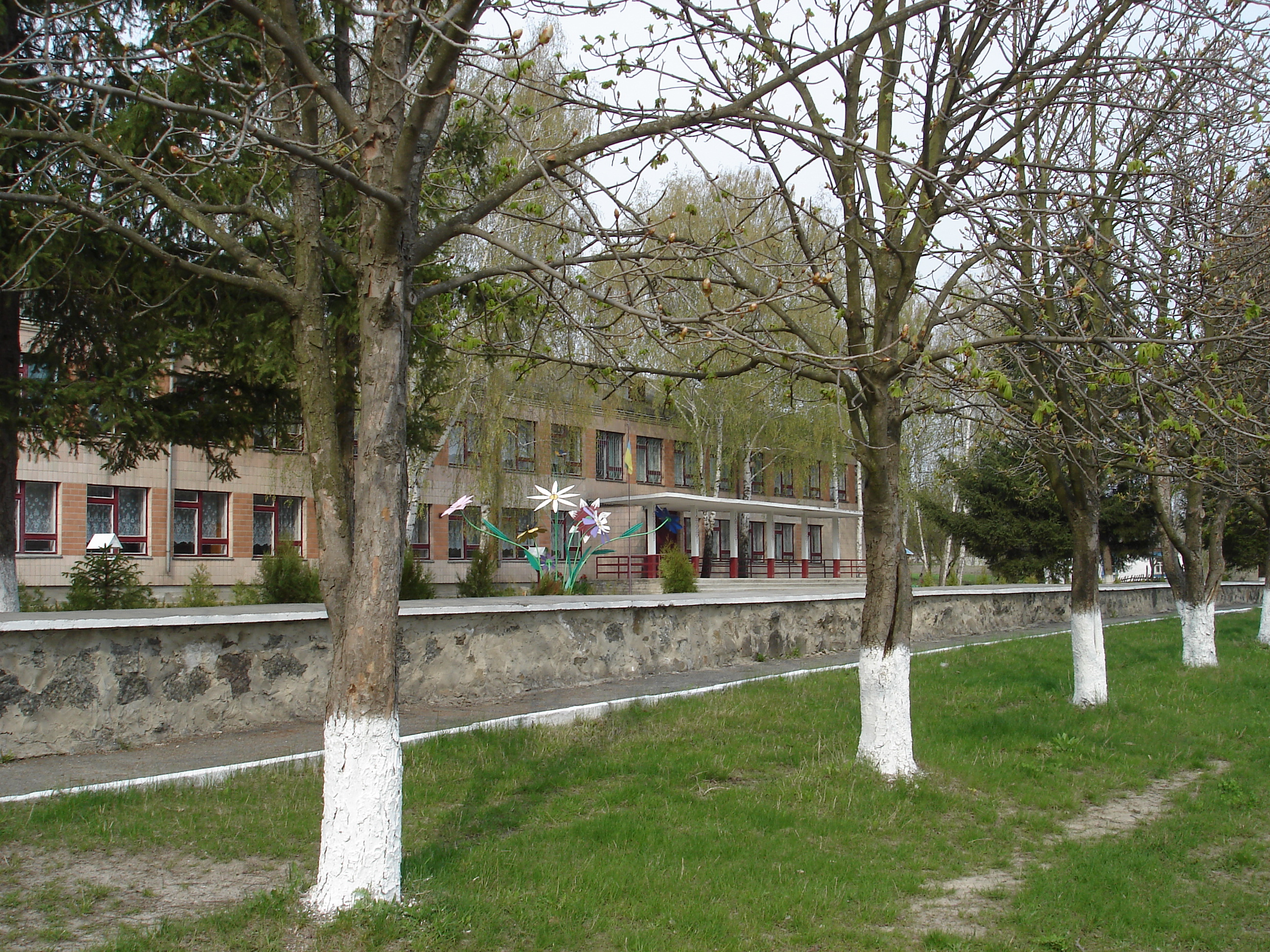 Заречье, школа, 2006.5